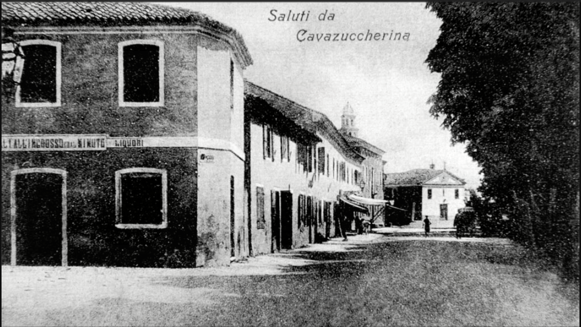 Veduta della chiesa di Cavazuccherina nei primi del '900